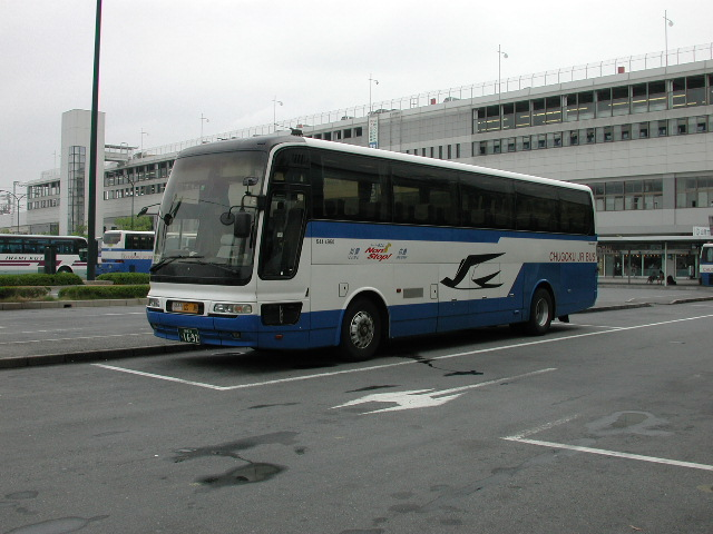 広島駅新幹線口にて 2000-8-18撮影